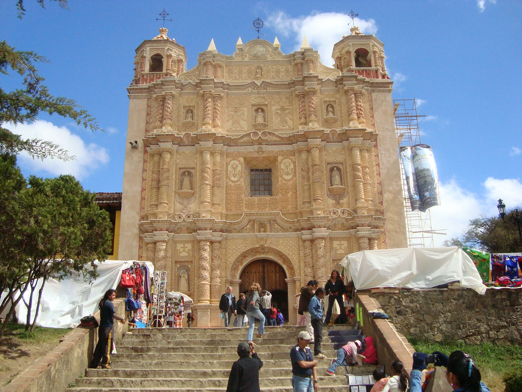 Convento de Santo Domingo, en San Cristóbal de las Casas, Chiapas.